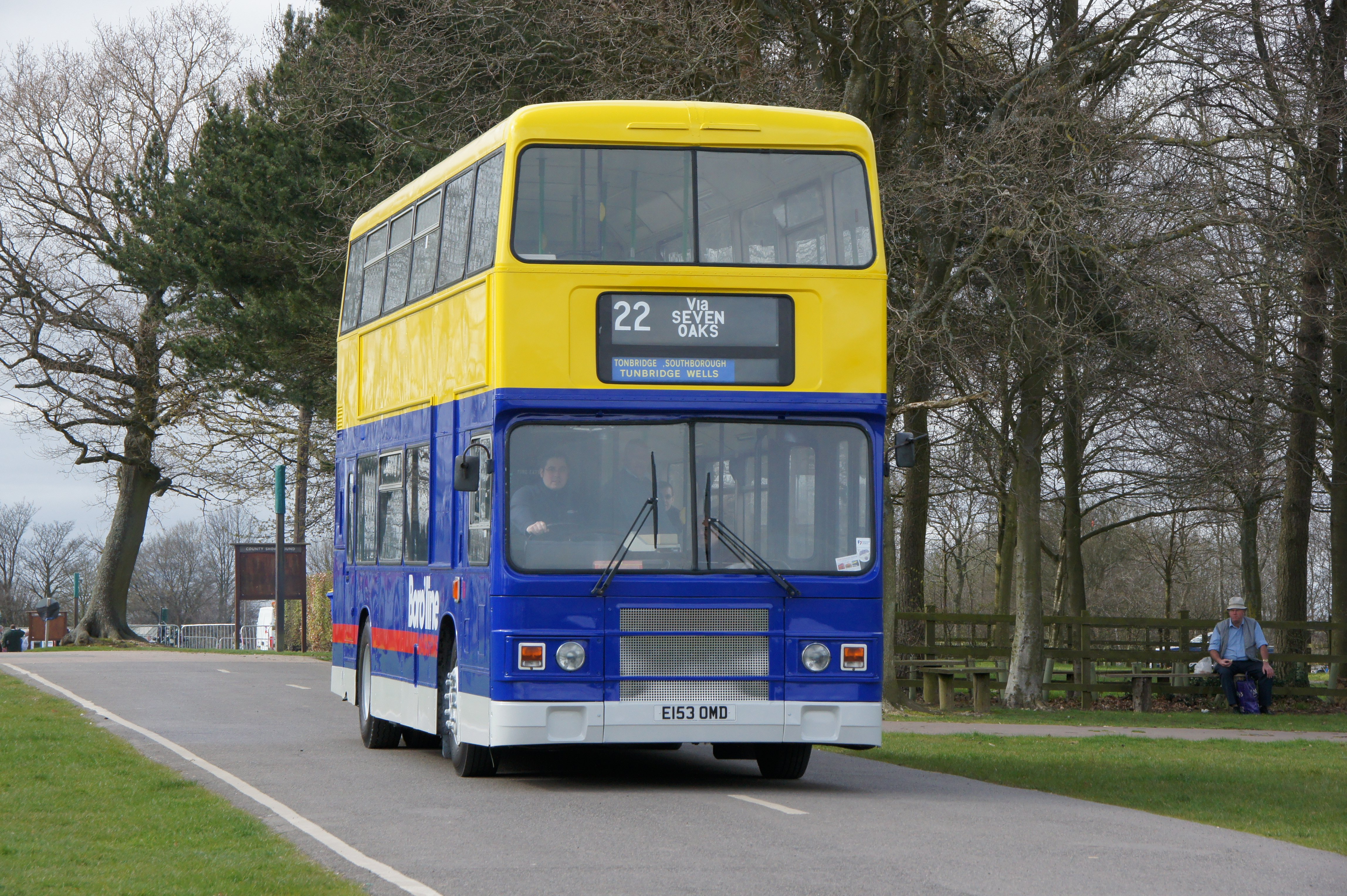 E153OMD-2 310312 CPS